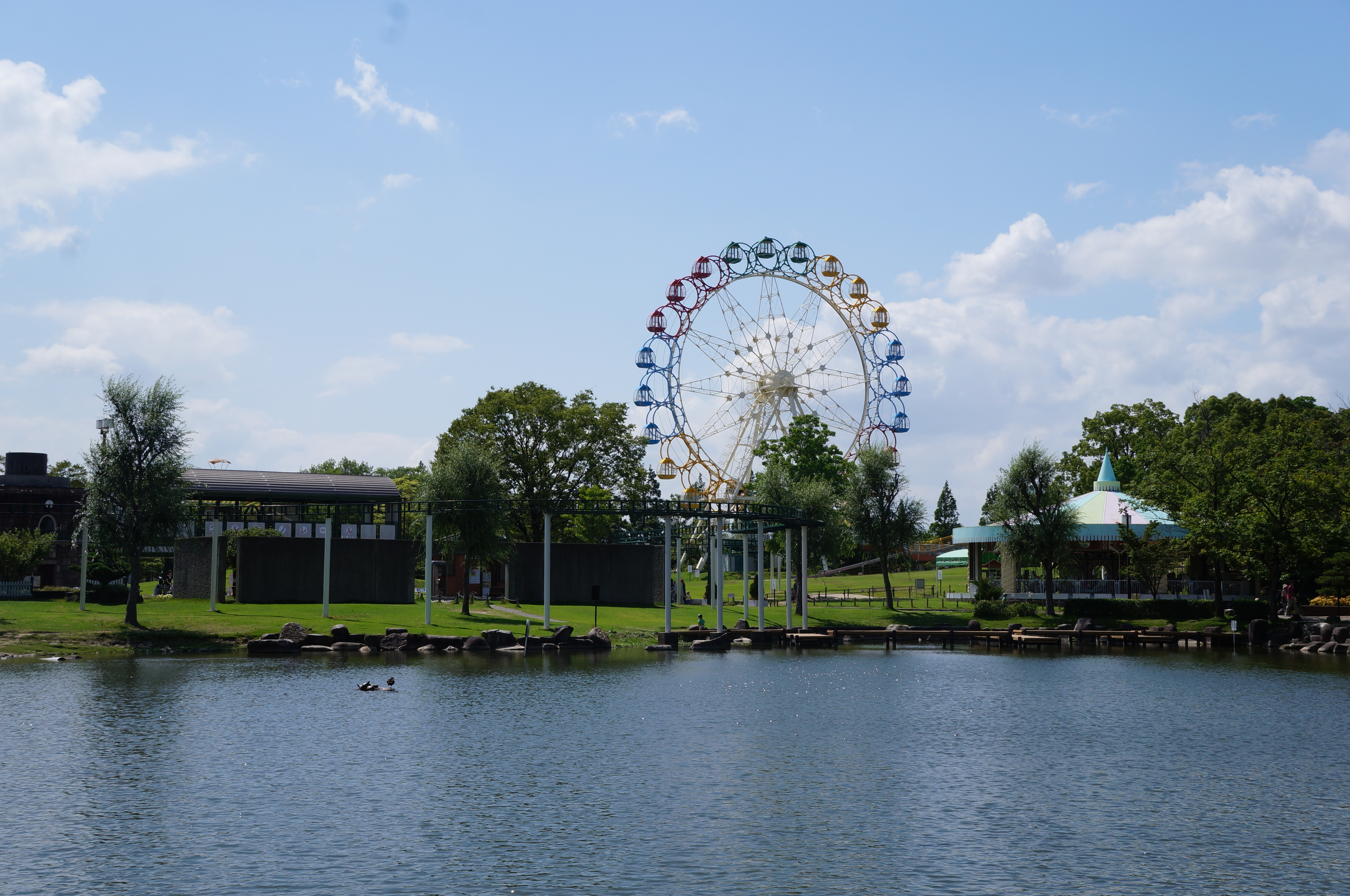 堀内公園（愛知県安城市）